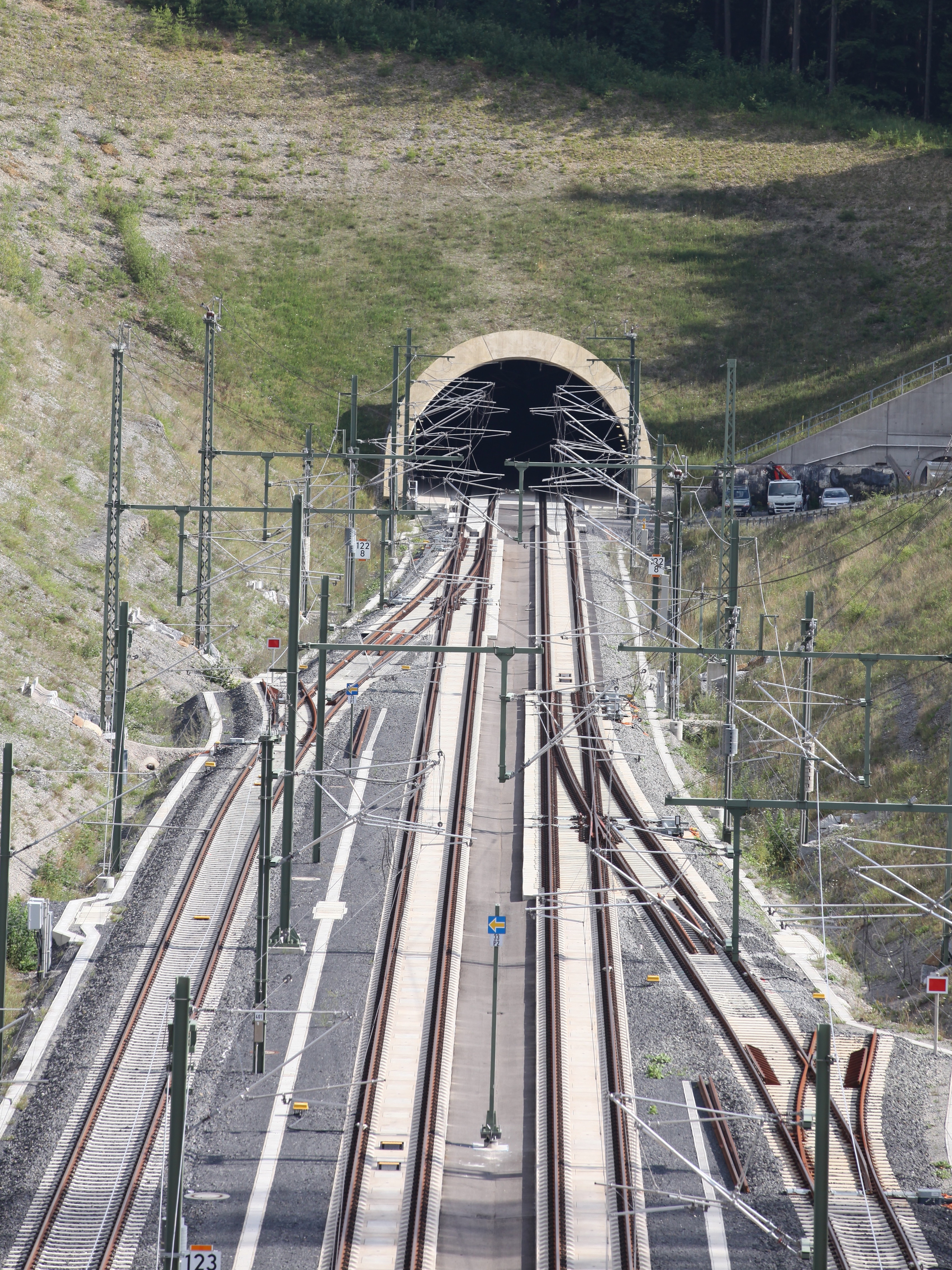 Überholbahnhof Theuern, Blick Richtung Süden